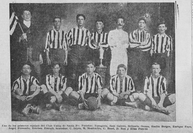 Equipo que se adjudicaria el primer trofeo en la historia del club